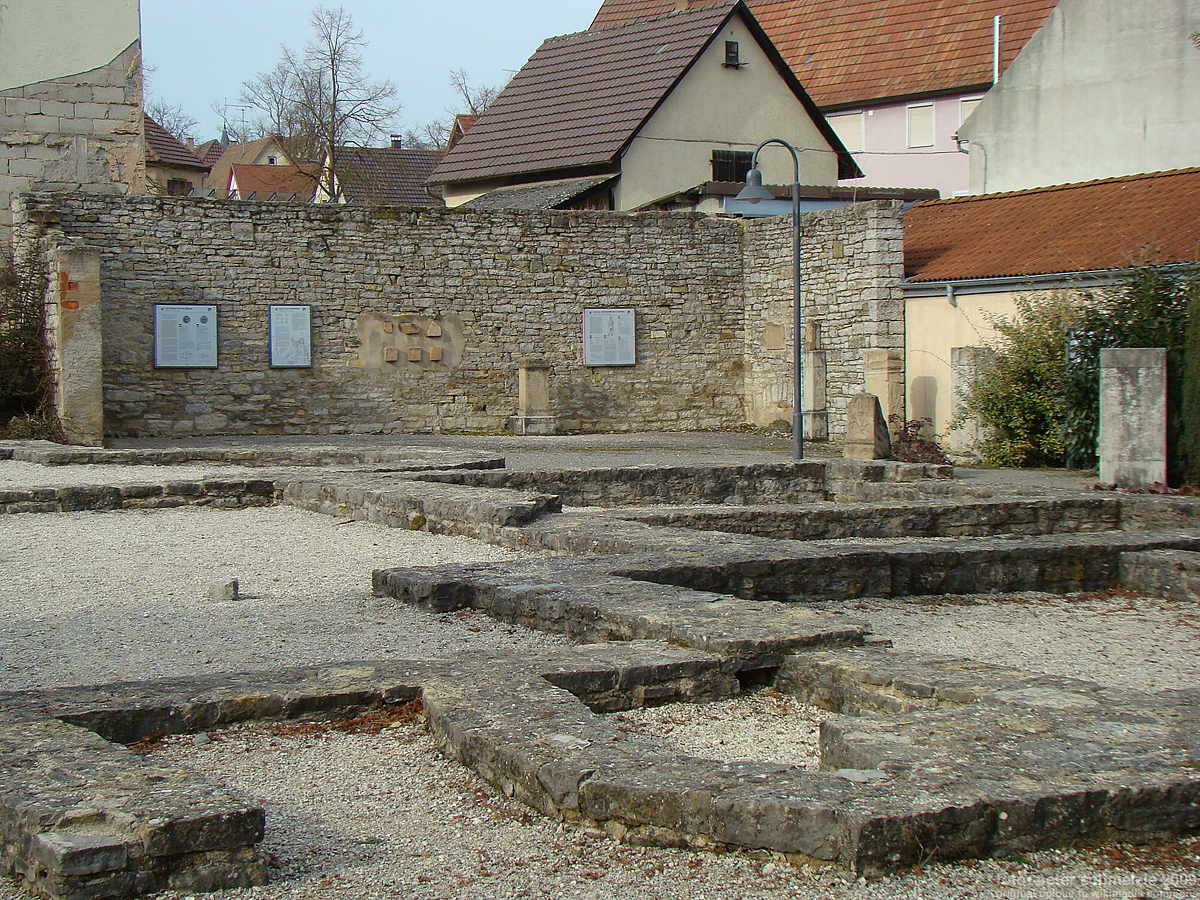 Römerbad Jagsthausen